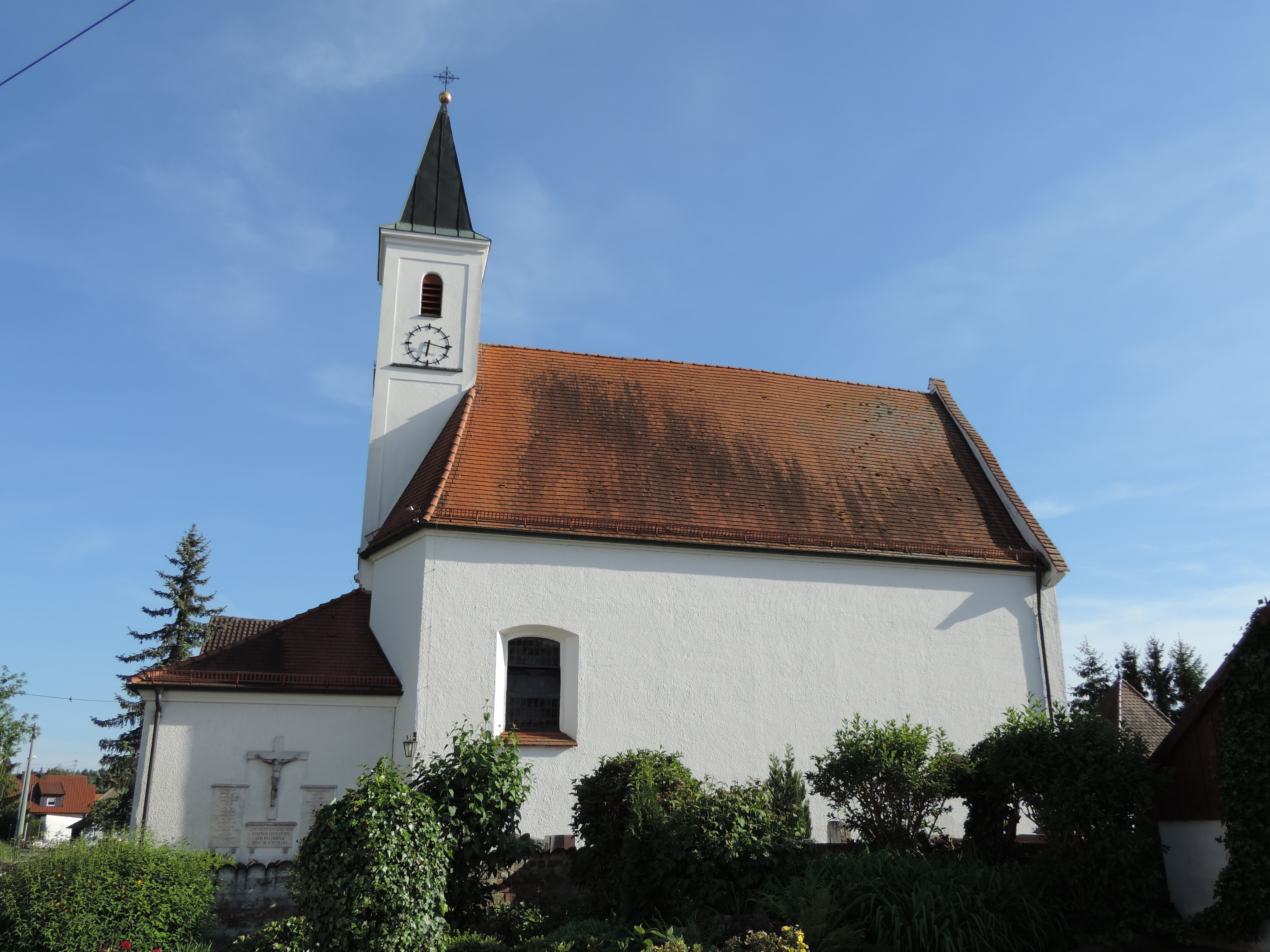 Nordseite